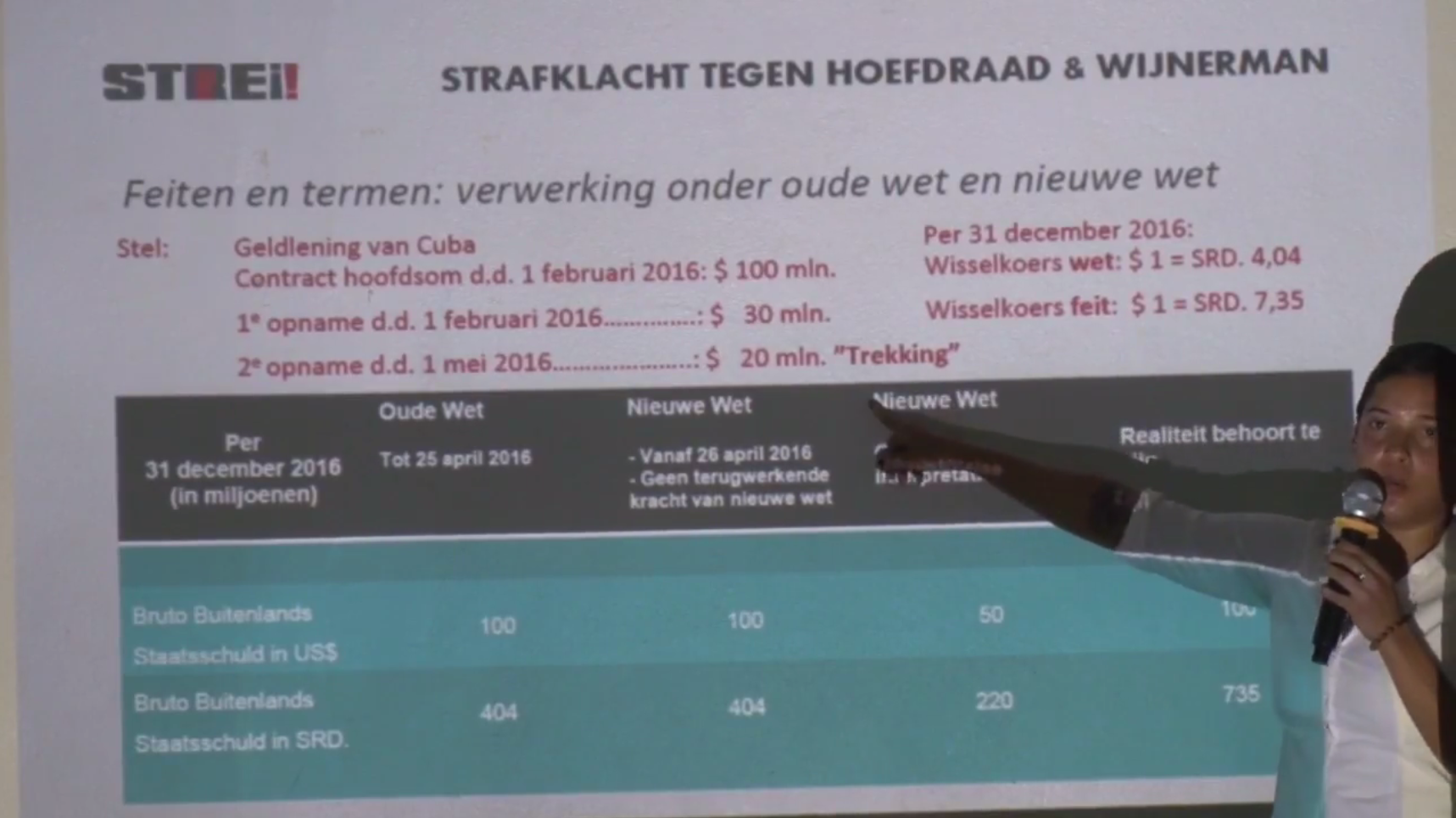 Maisha Neus, 2018